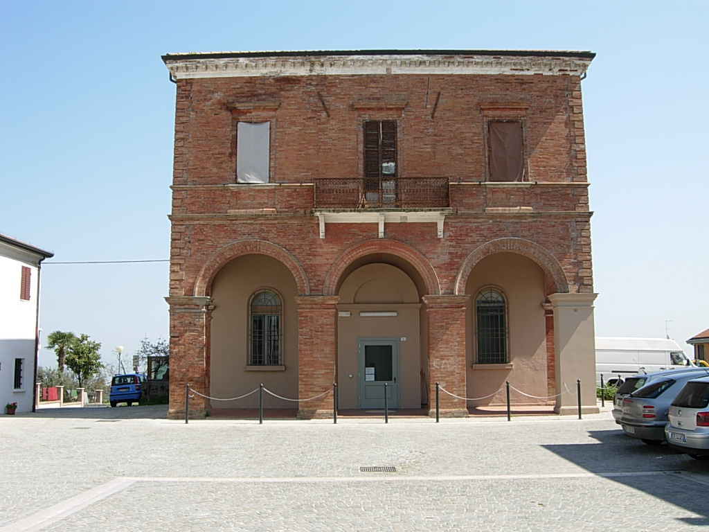 Vecchio municipio comunale a Misano Monte (Misano Adriatico)